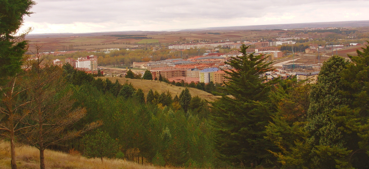 Vista del barrio de San Pedro de la Fuente desde el ""Cerro de San Miguel" , Burgos (España) .